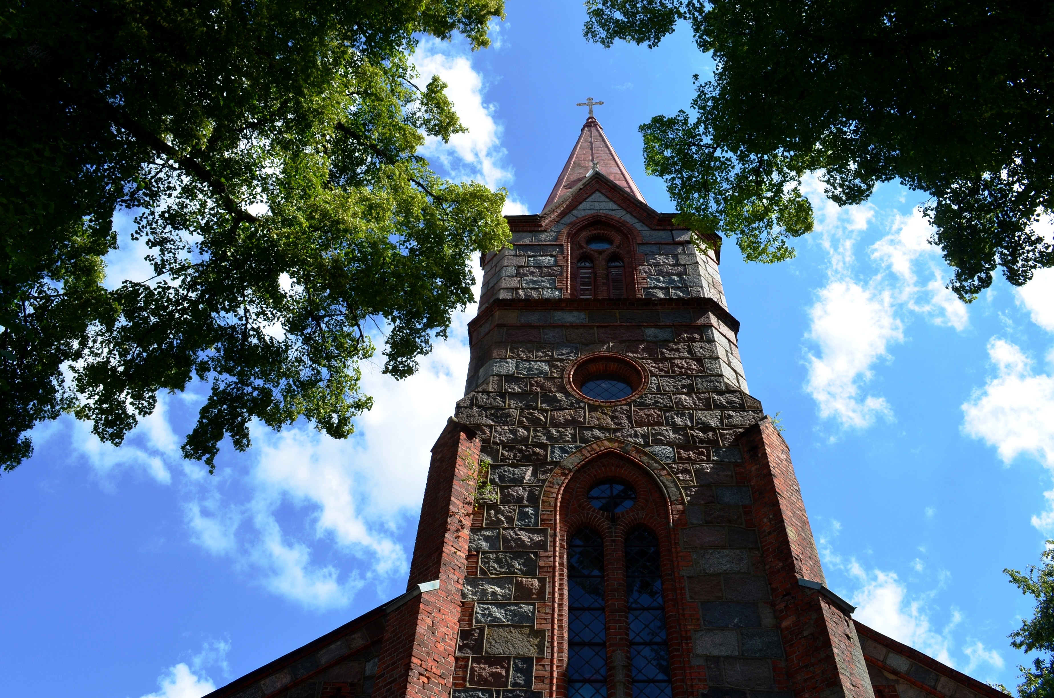 Kretingos liuteronų bažnyčia